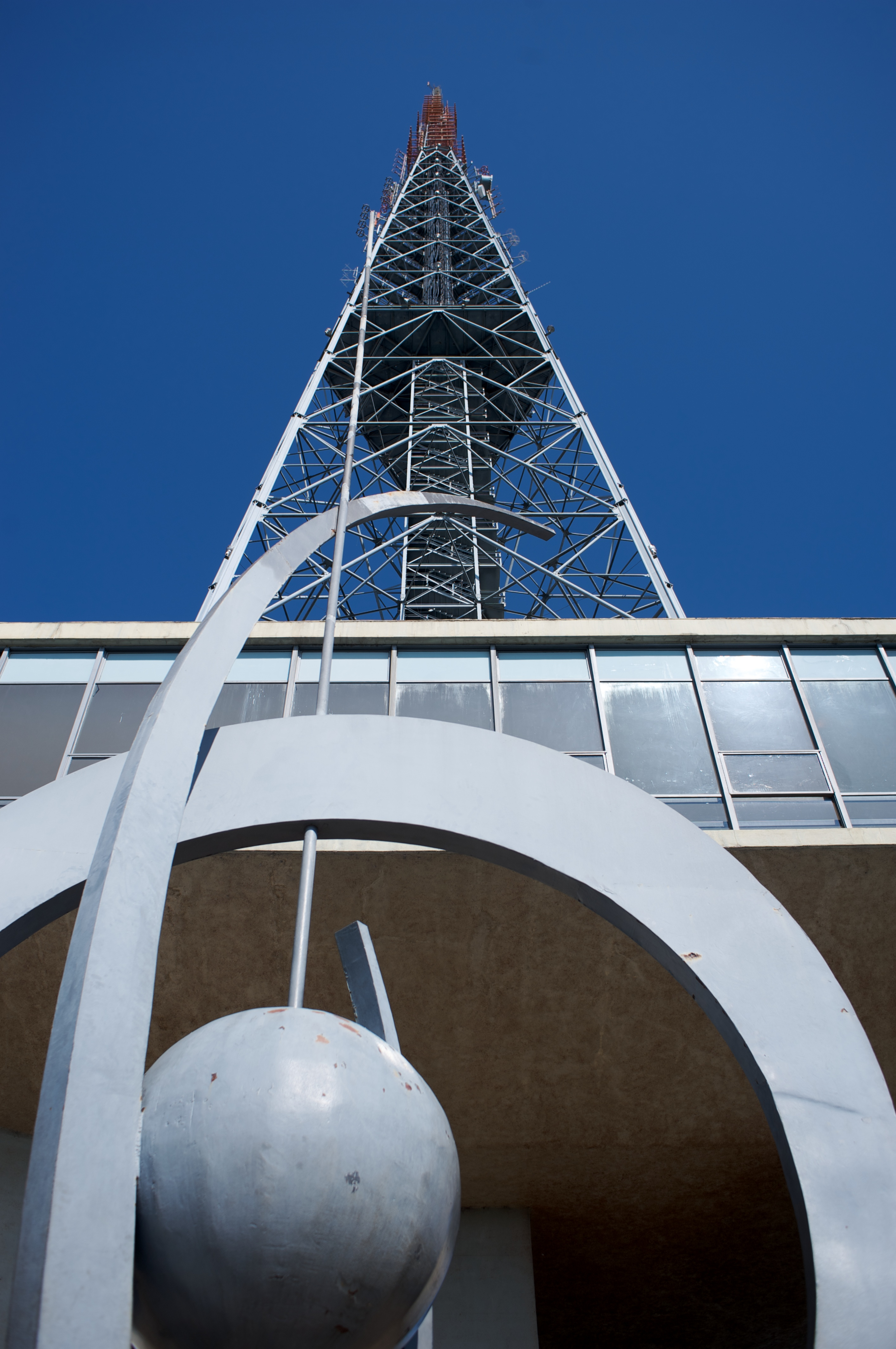 Torre de TV em Brasília, DF, Brasil